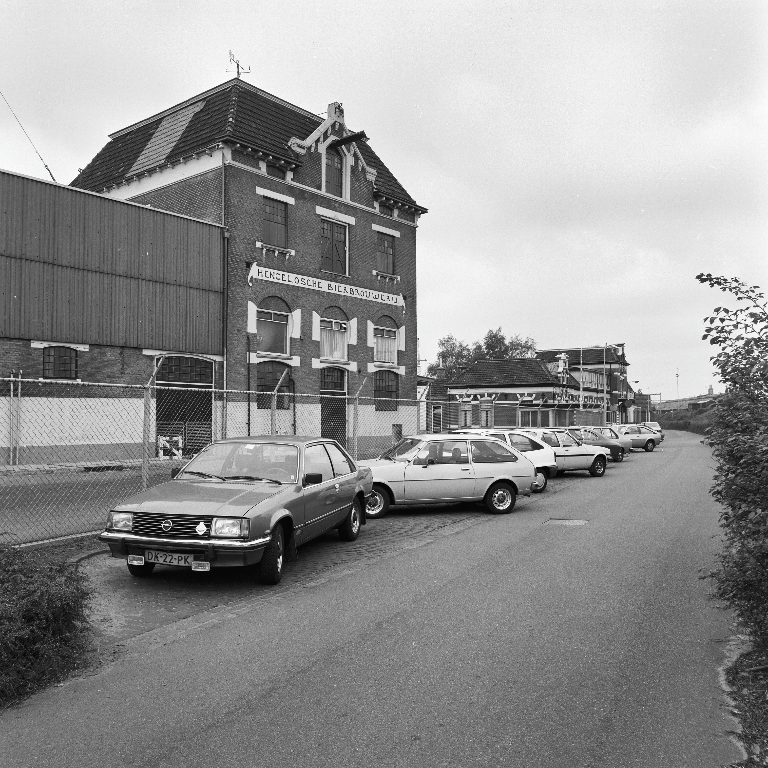 HENGELOSCHE BIERBROUWERIJ: Exterieur OVERZICHT